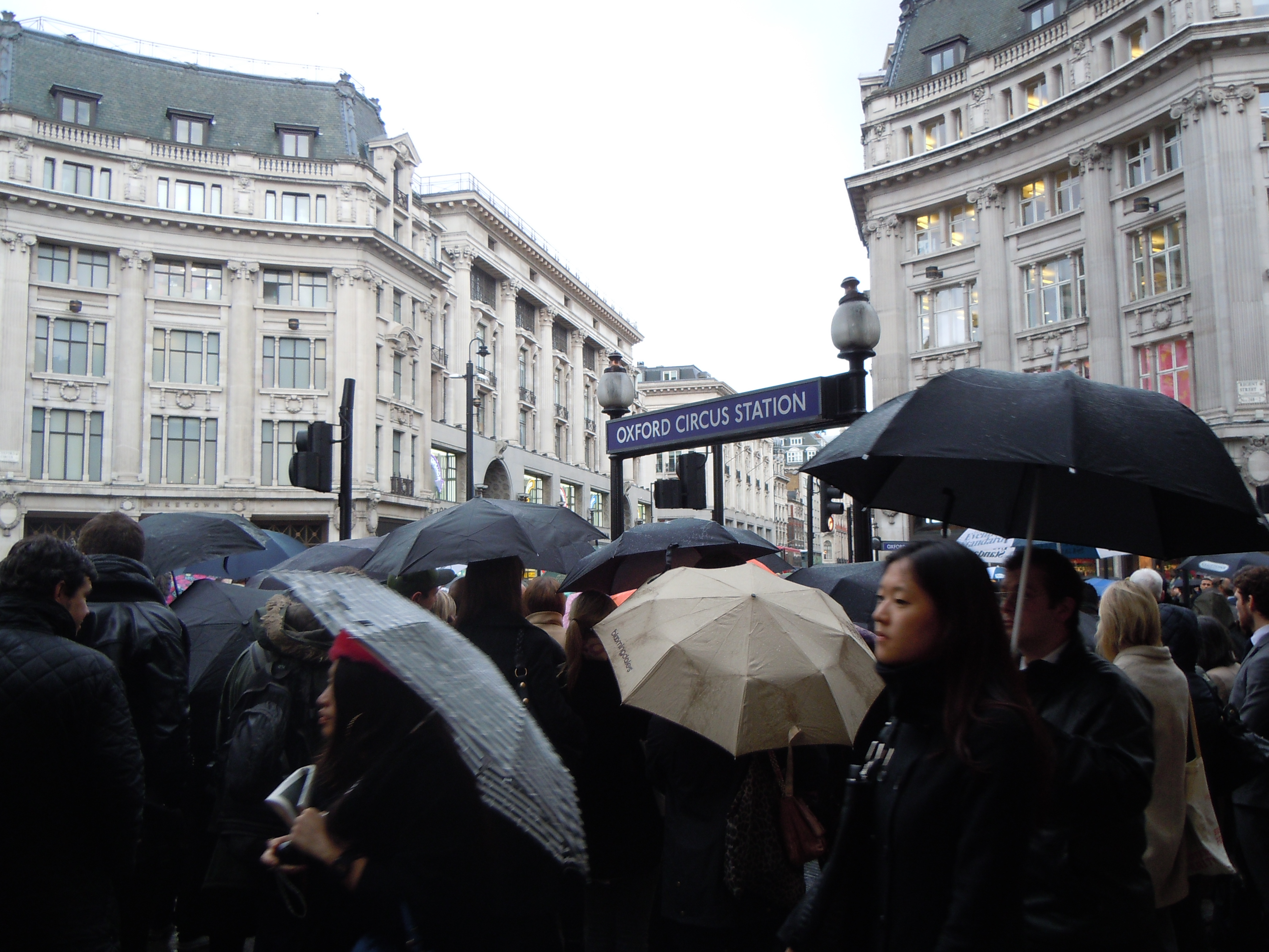 Oxford Circus tube station in Rush hour - Londres.